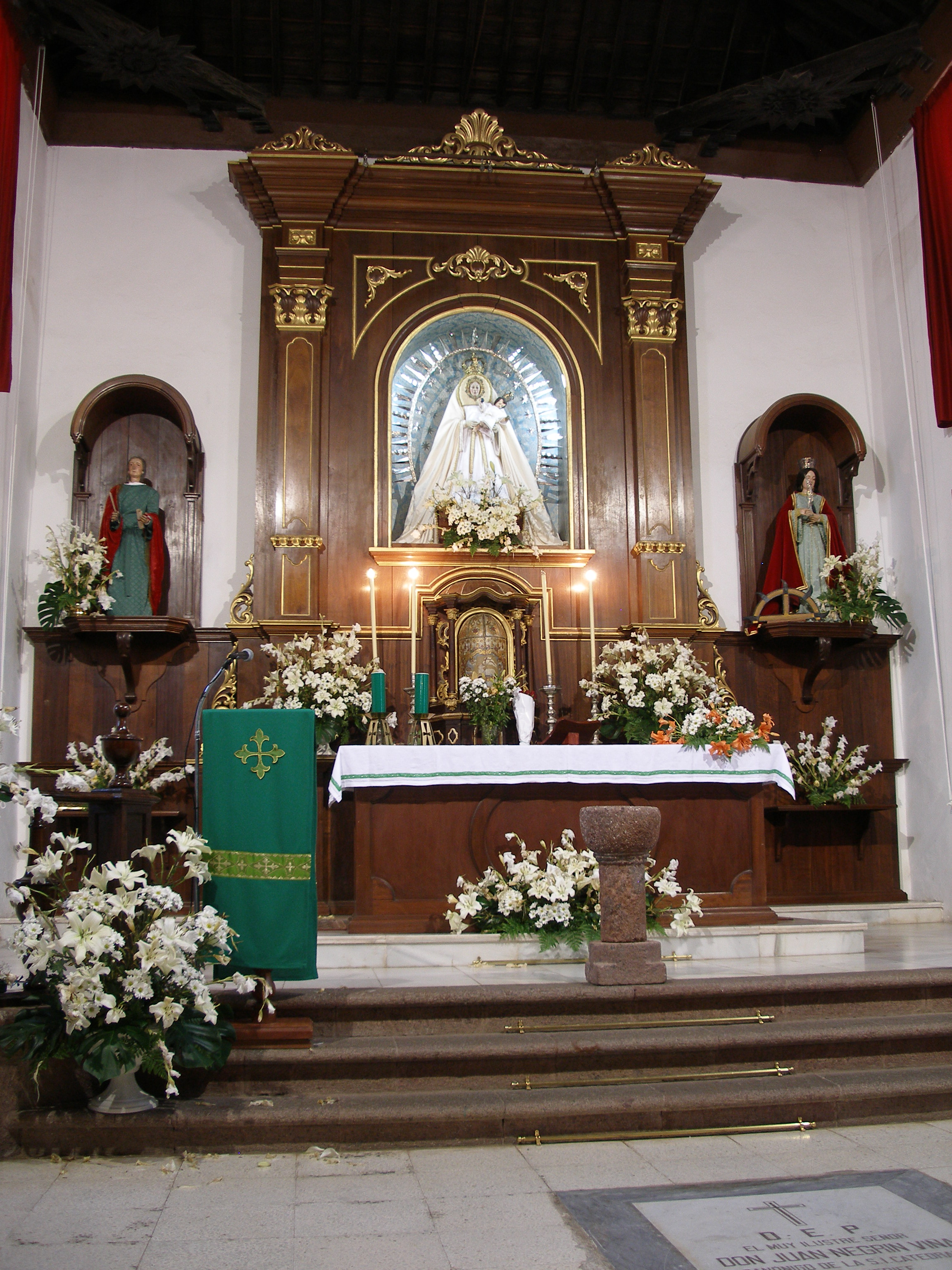 Altar mayor de la Iglesia de la Virgen de Las Nieves en Taganana, Tenerife